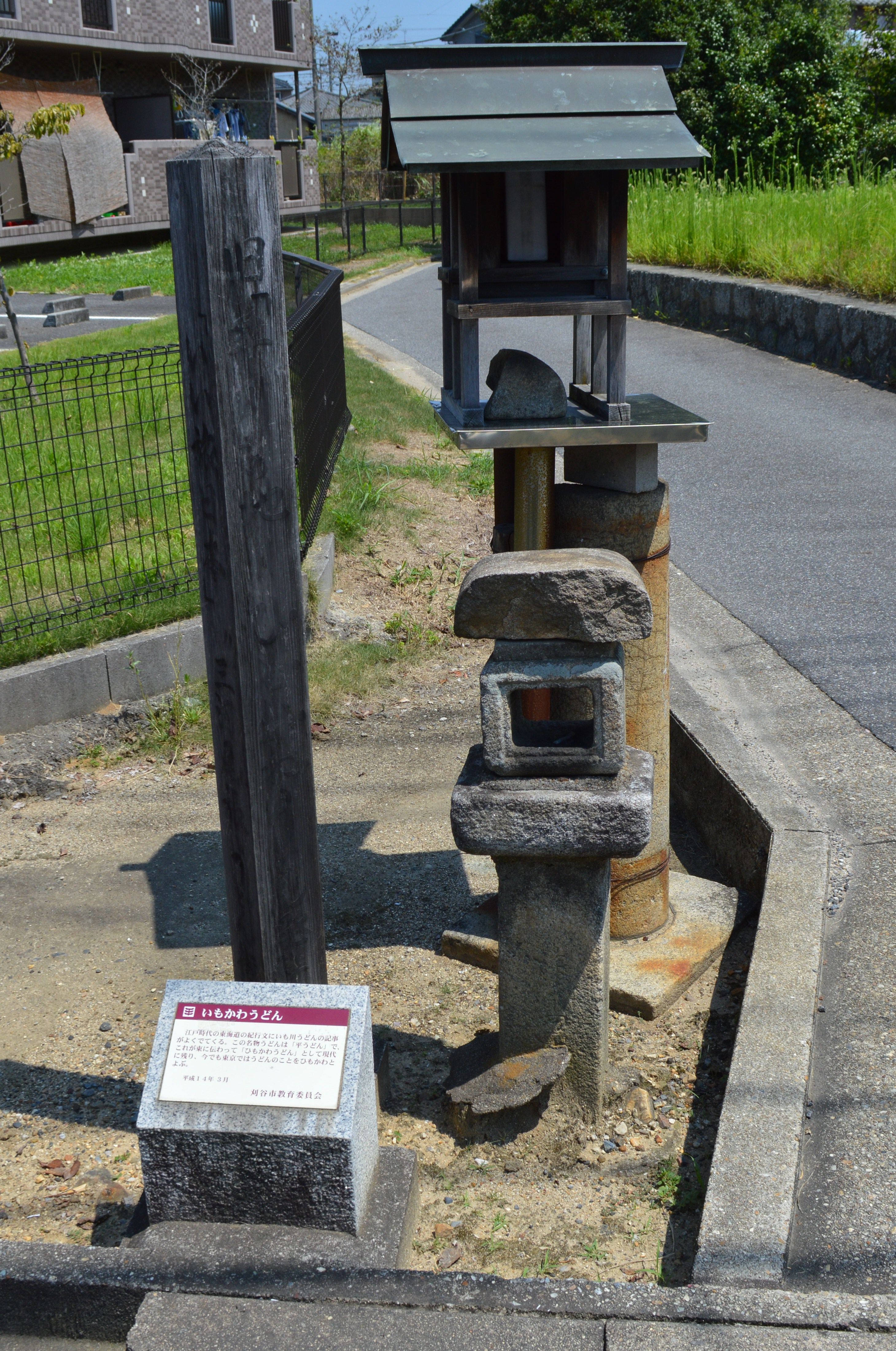 愛知県刈谷市にあるいもかわうどんの碑